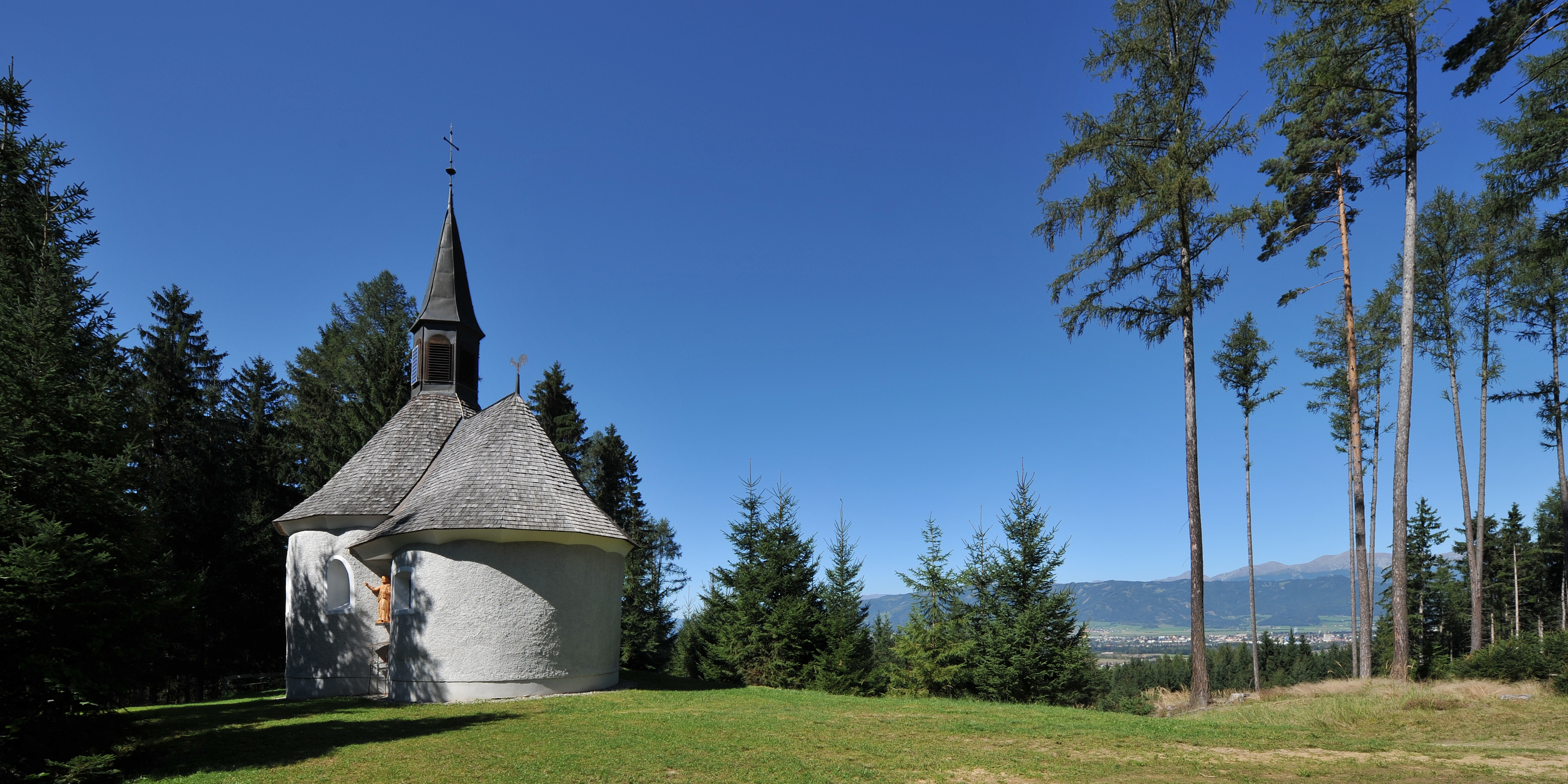 Kath. Filialkirche St.Maximilian, sog. Maxlan Kapelle